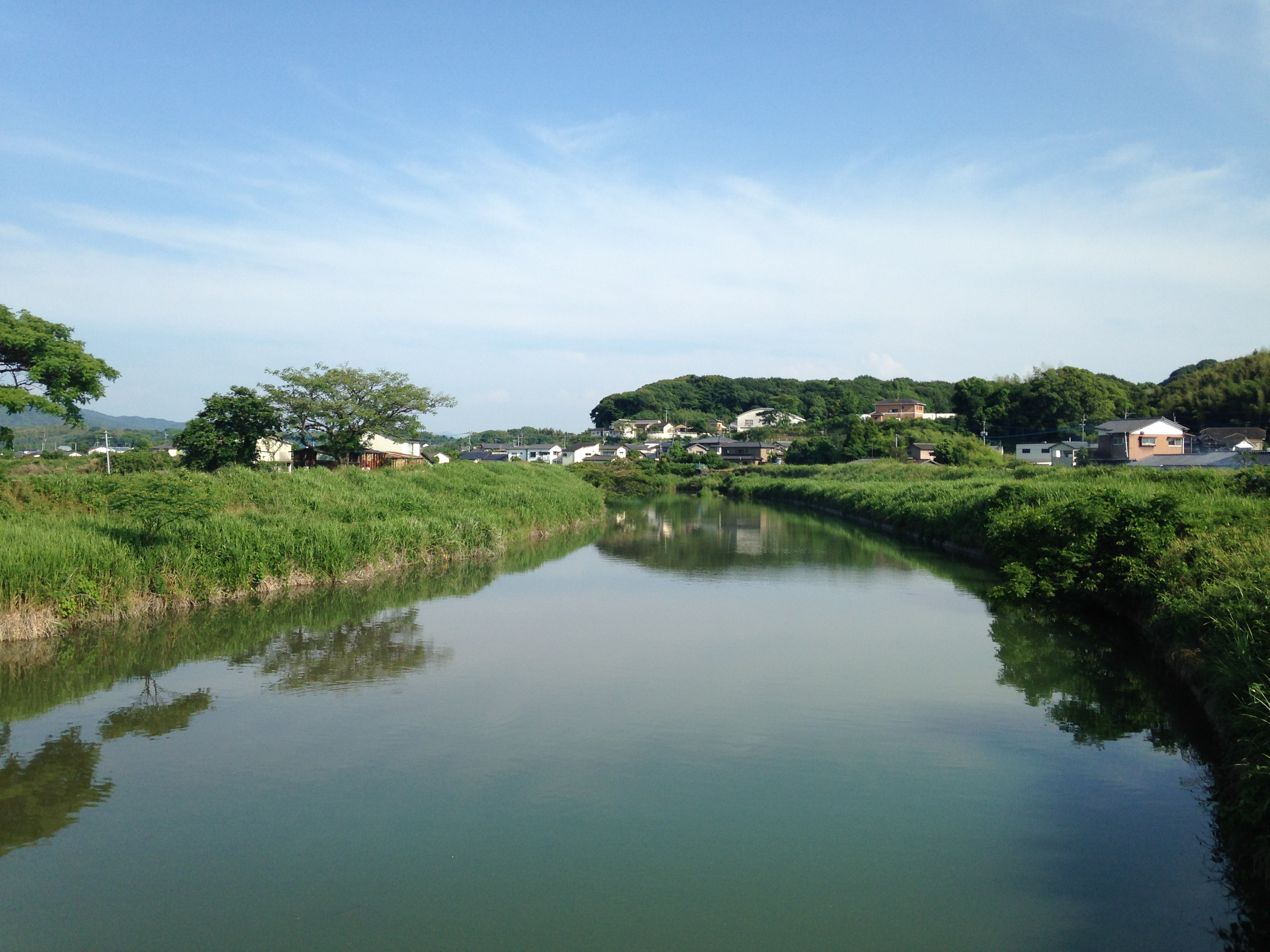 臼井橋より望む諏訪川(上流側)